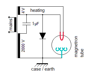 Elektrische Schaltung eines Mikrowellengerätes